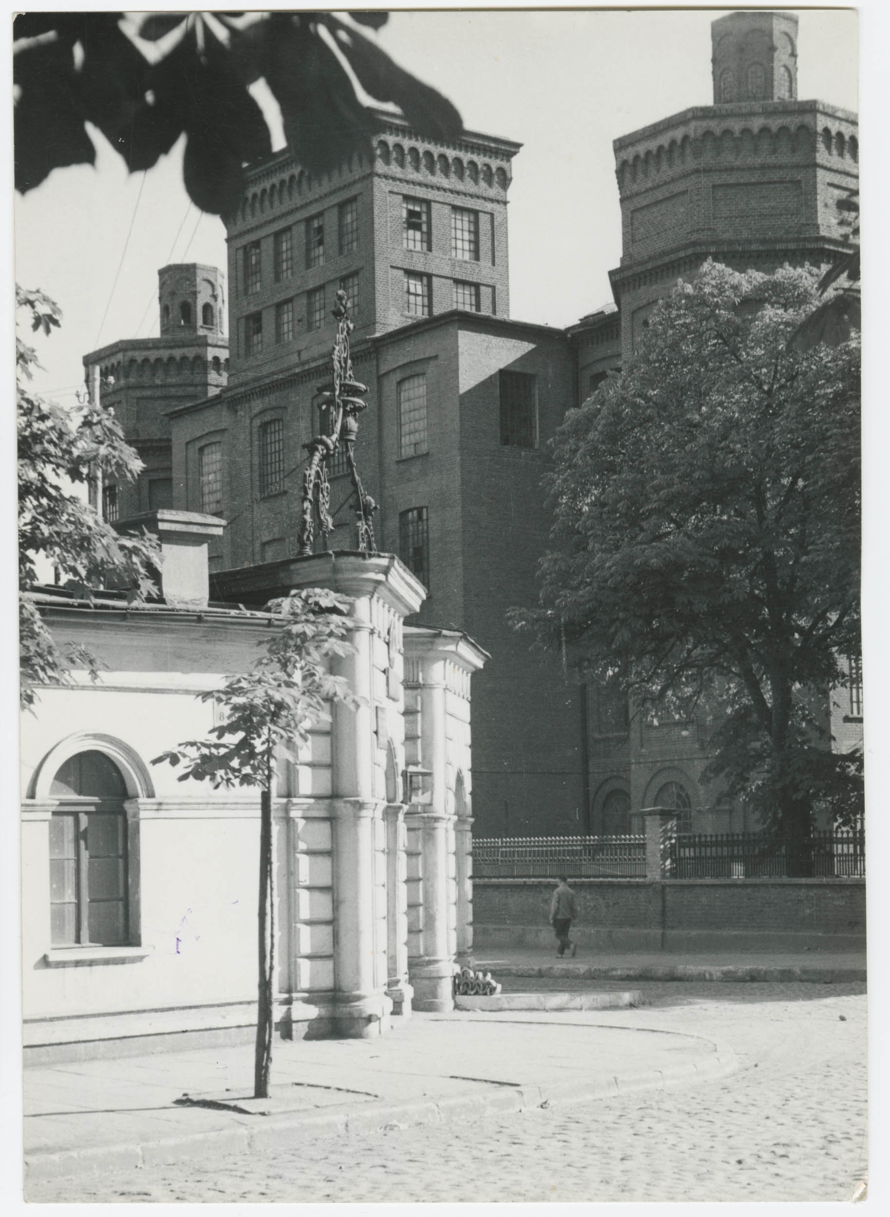 Fotografia Ignacego Płażewskiego przedstawiająca fragment zabudowy przy wejściu do pałacu Edwarda Herbsta przy ulicy 8 Marca (ob. Przędzalniana). W tle widoczny jest monumentalny budynek przędzalni zespołu fabrycznego Karola Scheiblera z charakterystycznymi ośmiobocznymi narożnymi wieżami. Pałac powstał około 1875 roku jako rezydencja Edwarda Herbsta i jego żony Matyldy, córki Karola Scheiblera. Gmach pozostawał w posiadaniu rodziny do 1942 r.. Po zakończeniu II wojny światowej był siedzibą min. Ośrodka Szkolenia Pracowników Pomocy Społecznej, Domu Pobytu Dziennego dla Nerwowo Chorych, ORMO, a nawet Spółdzielni Inwalidów. W 1976 r. rezydencja została przejęta przez Muzeum Sztuki i do dziś mieści się w nim oddział tej placówki Muzeum Pałac Herbsta. Obecnie budynek przędzalni dostosowany został w ramach rewitalizacji zakończonej w 2010 r. do celów mieszkalnych.